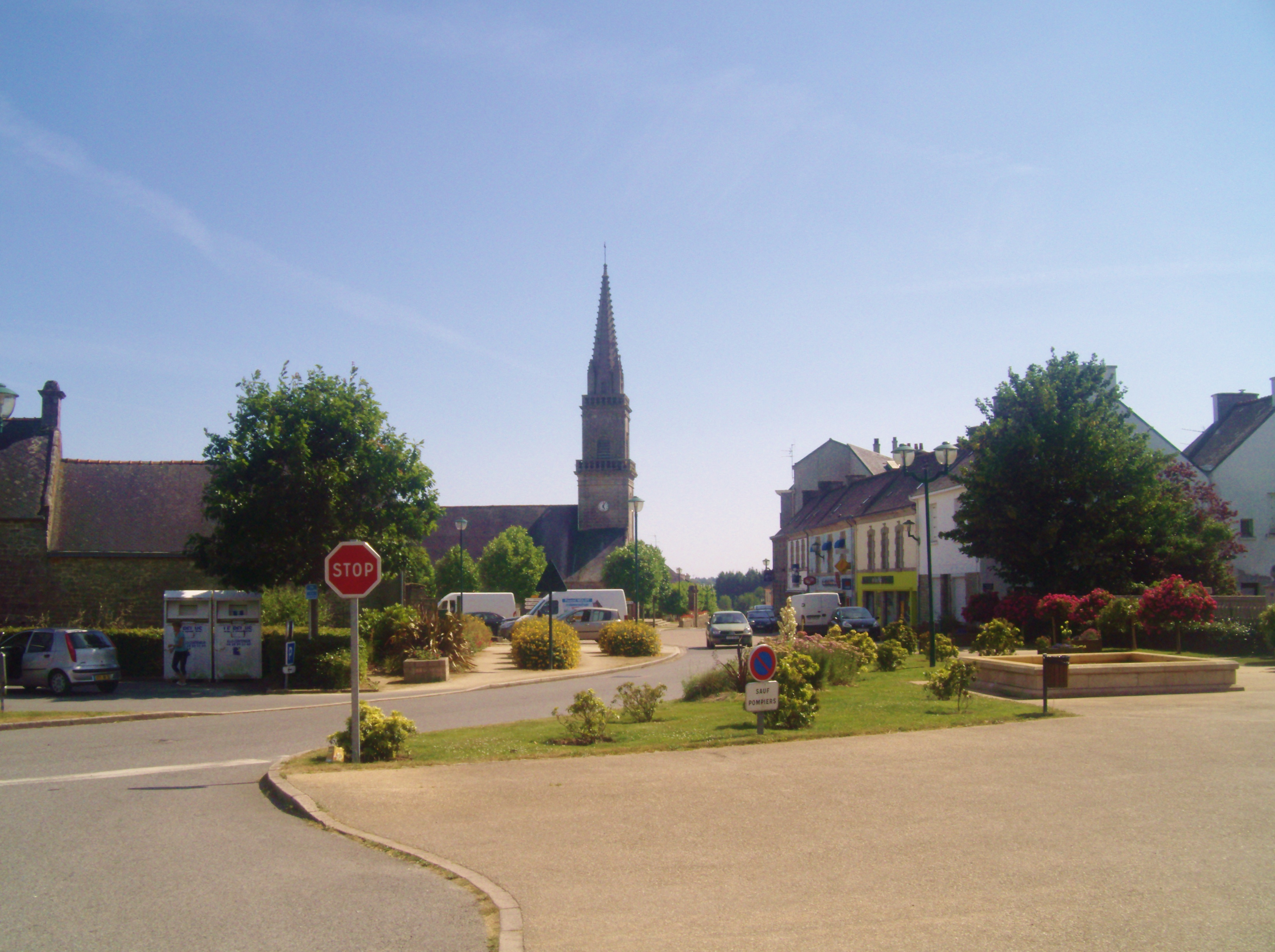 le bourg d'Inguiniel (commune du Morbihan)